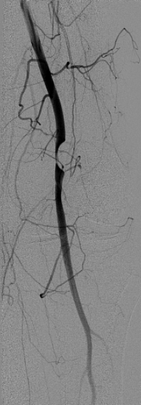 Zystische Adventitiadegeneration der Arteria poplitea bei einem sonst gefäßgesunden Mann um die 40. Es traten subakut rezidivierende Durchblutungsstörungen auf. Die Angiographie zeigt die scharfe, bogenförmige Einengung durch de Zyste. Unter Kenntnis des MRTs ist caudal davon eine weitere sehr flache Einengung zu erkennen.